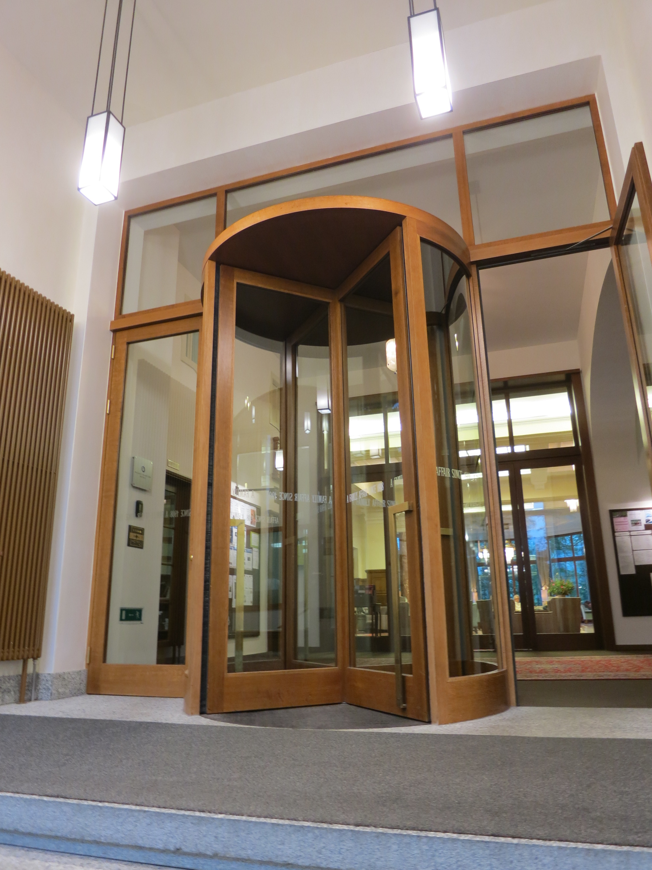 Hotel Waldhaus, Sils im Engadin GR, Schweiz